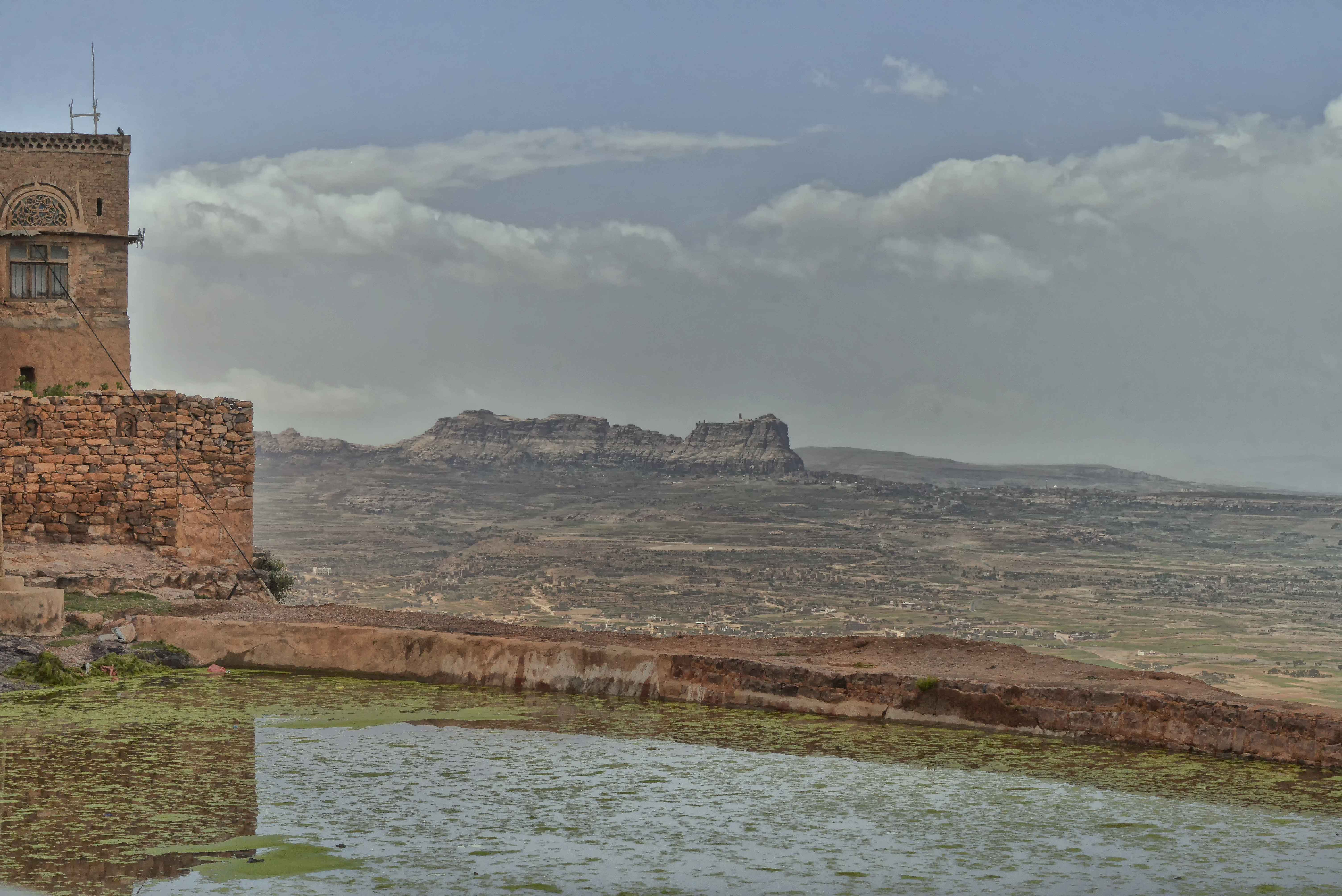 Kawkaban, Yemen